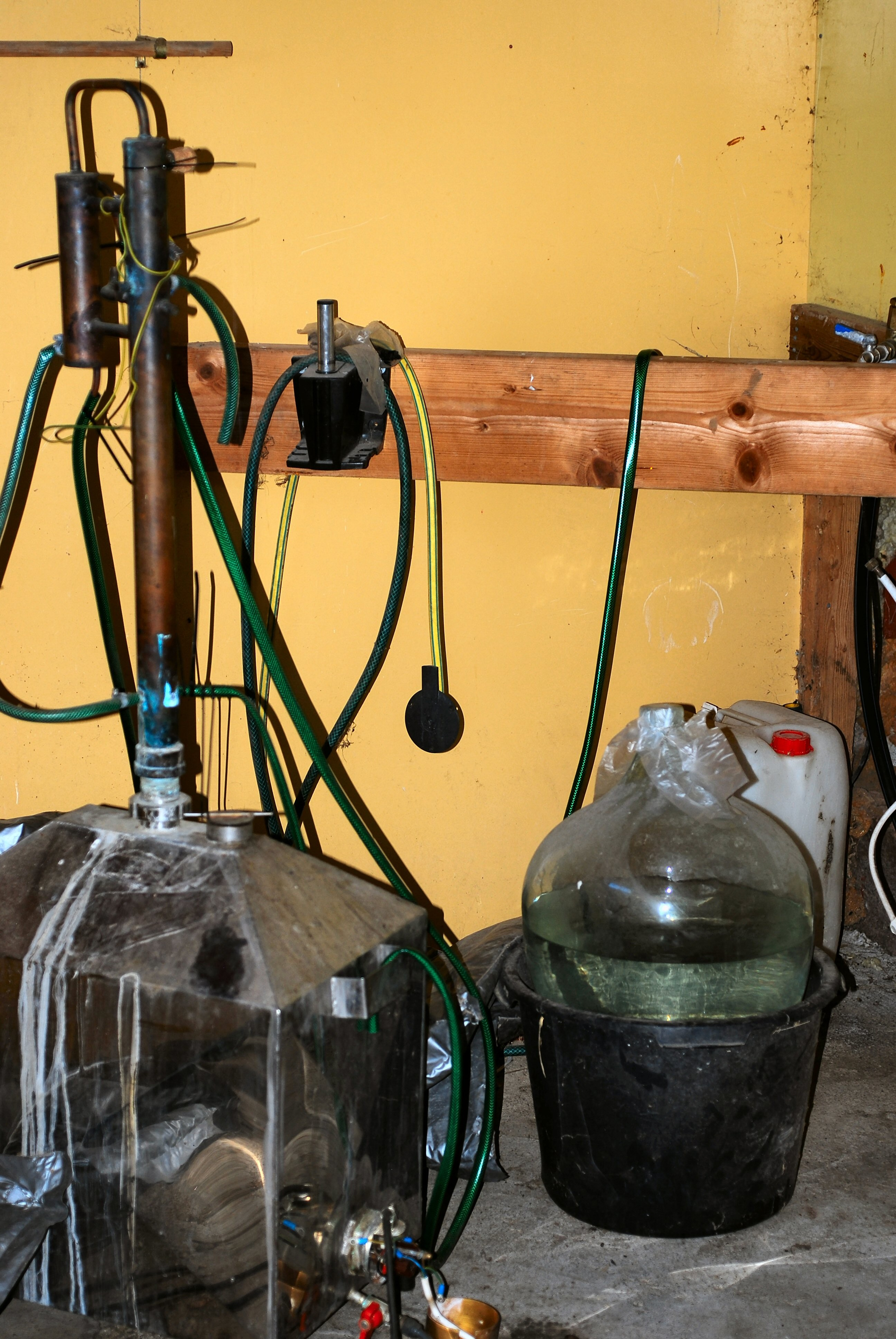 Himkokapparat fra en gård i Trøndelag. Til høyre i bildet vises resultatet i en ballong.